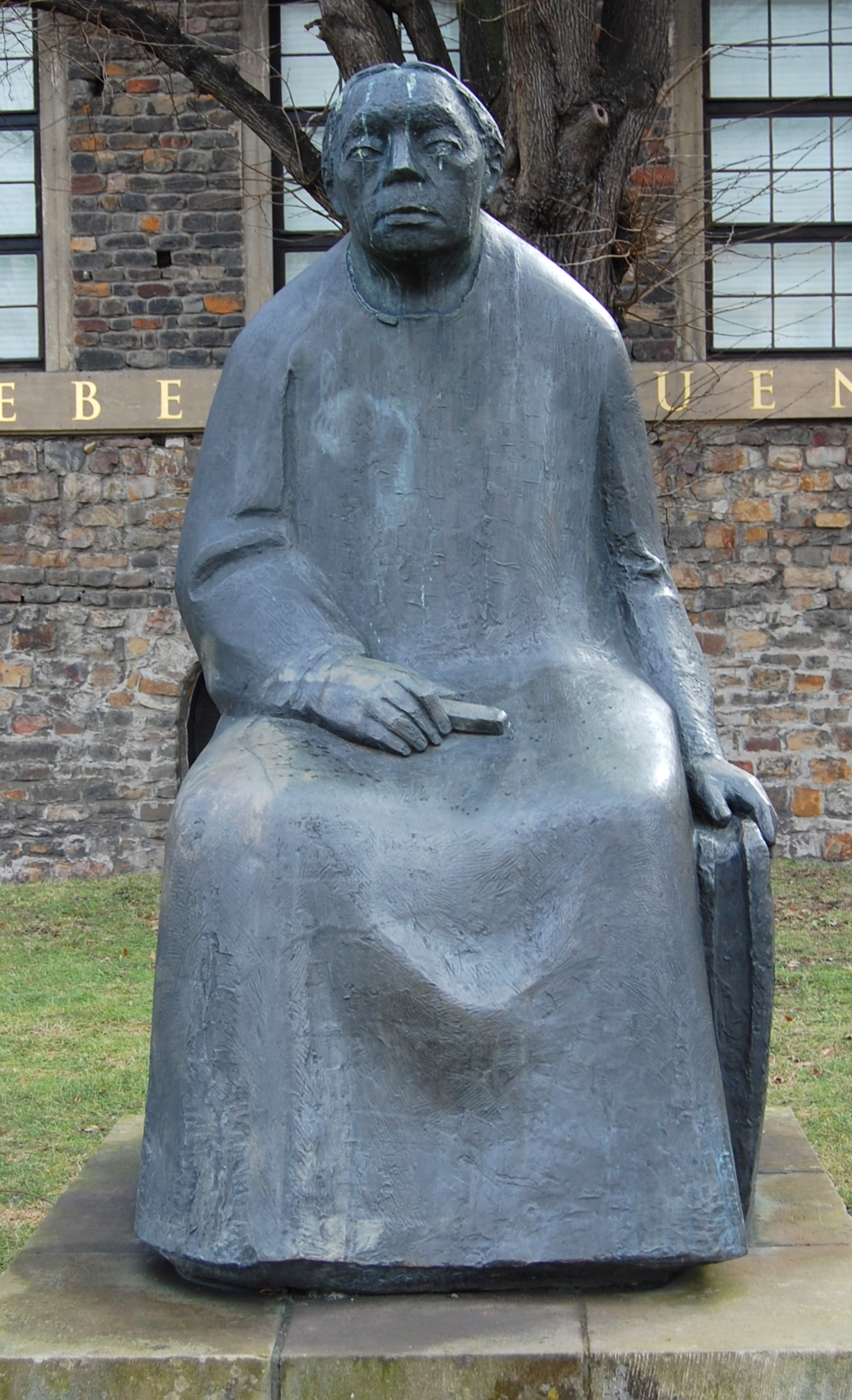 Käthe-Kollwitz-Plastik von Gustav Seitz, Magdeburg, vor der Kloster Unser Lieben Frauen